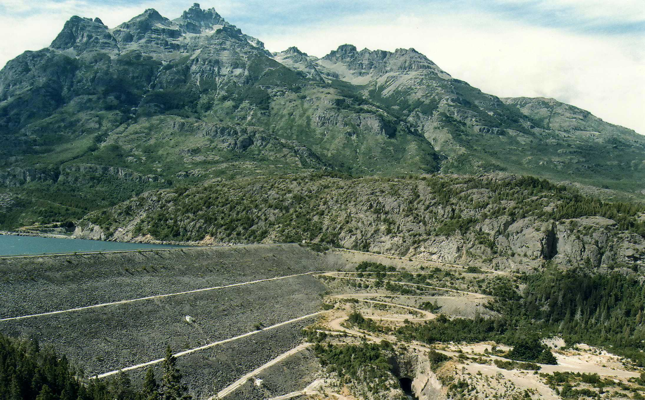 Paredón de la Presa de Futaleufú, Chubut, Argentina